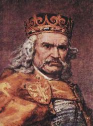 Władysław I Łokietek